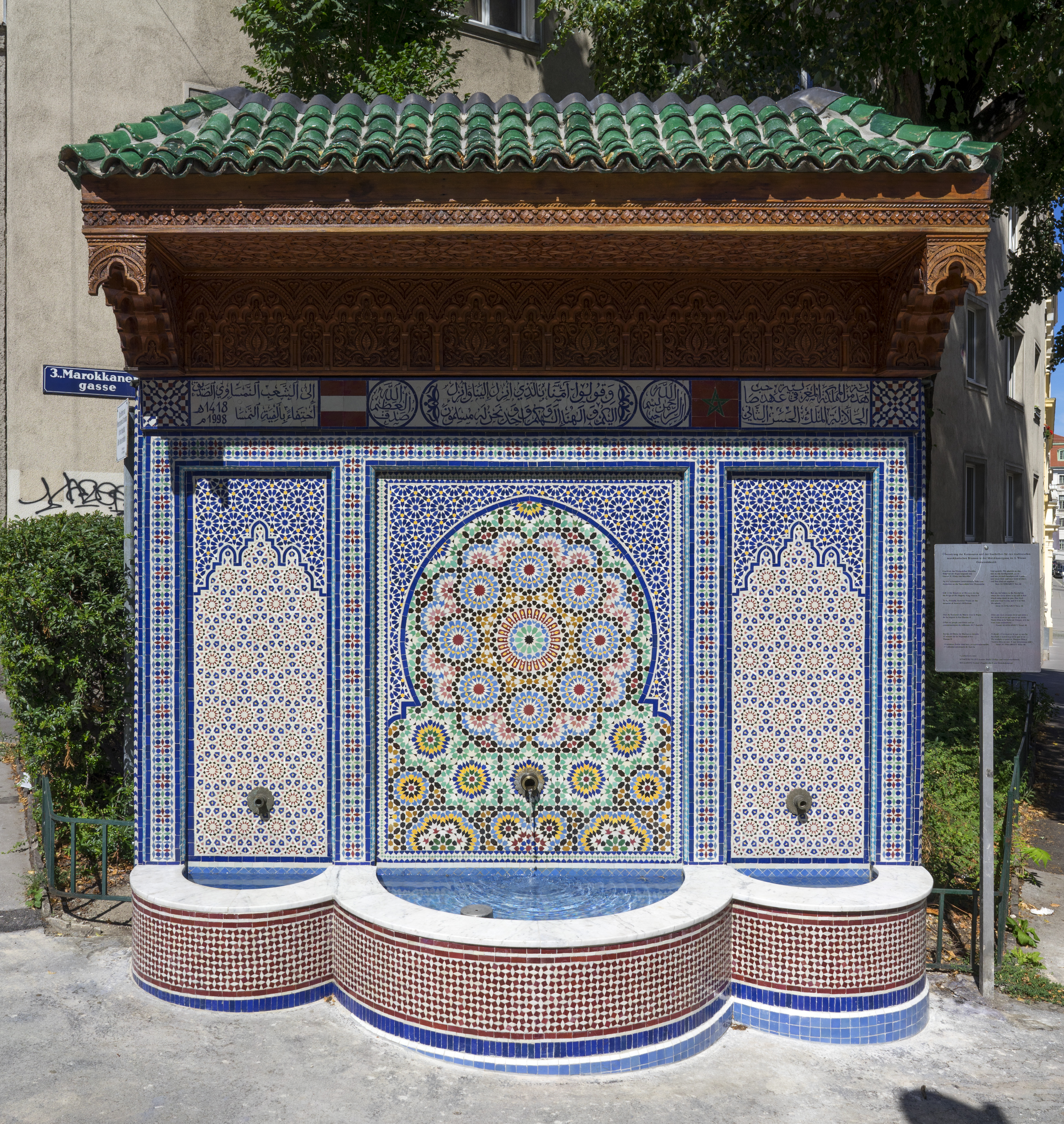 Marokkanerbrunnen, Vienna Nach der Sanierung